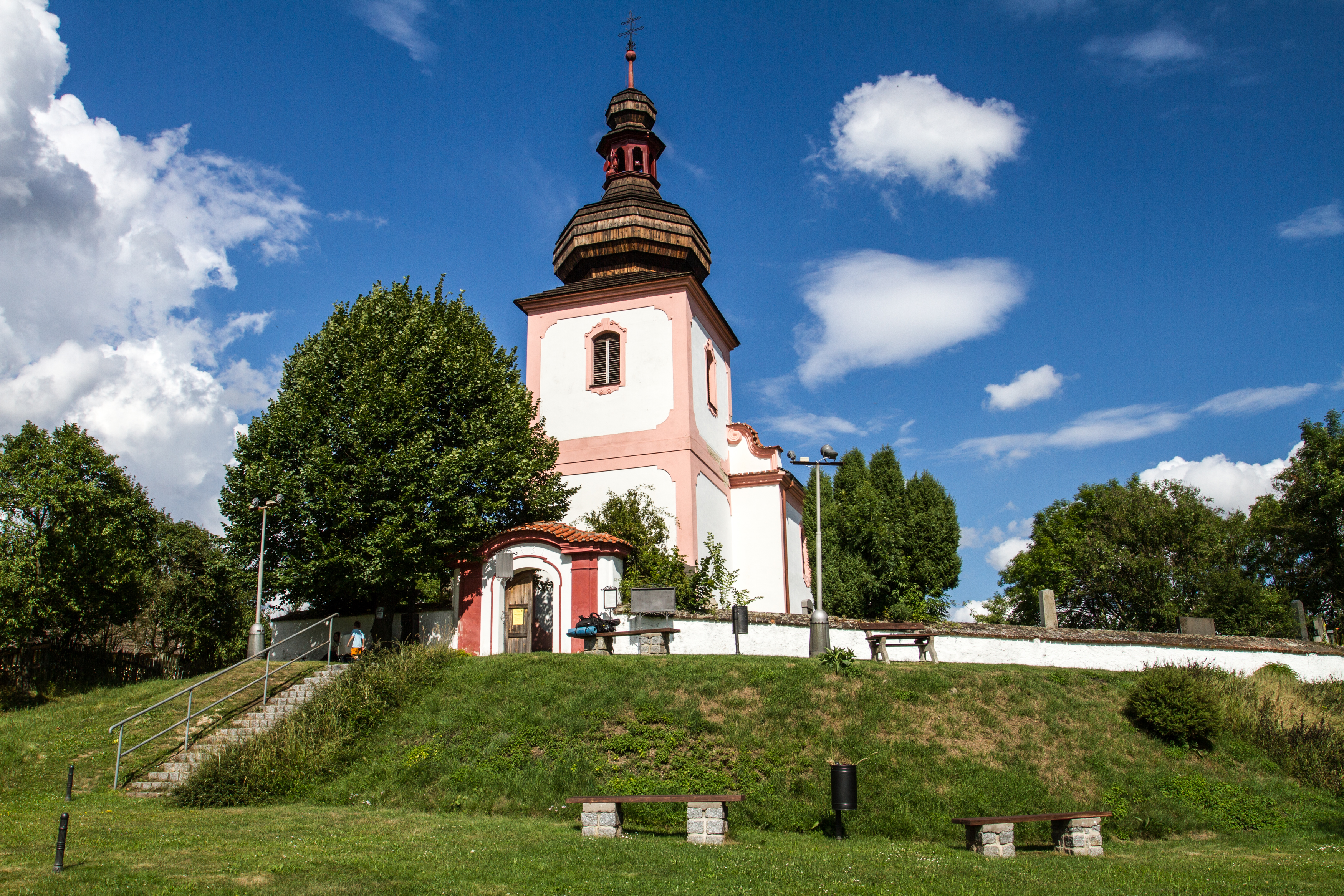 Hradiště Lštění s kostelem svatého Klimenta, Zlenice 6, Hradiště, Lštění.